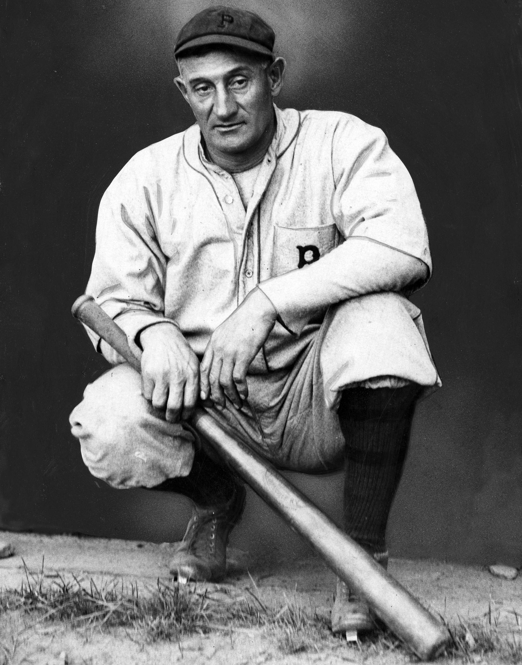 Honus Wagner